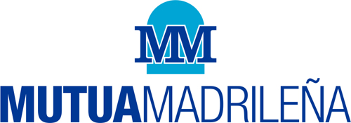 Logo Mutua Madrileña